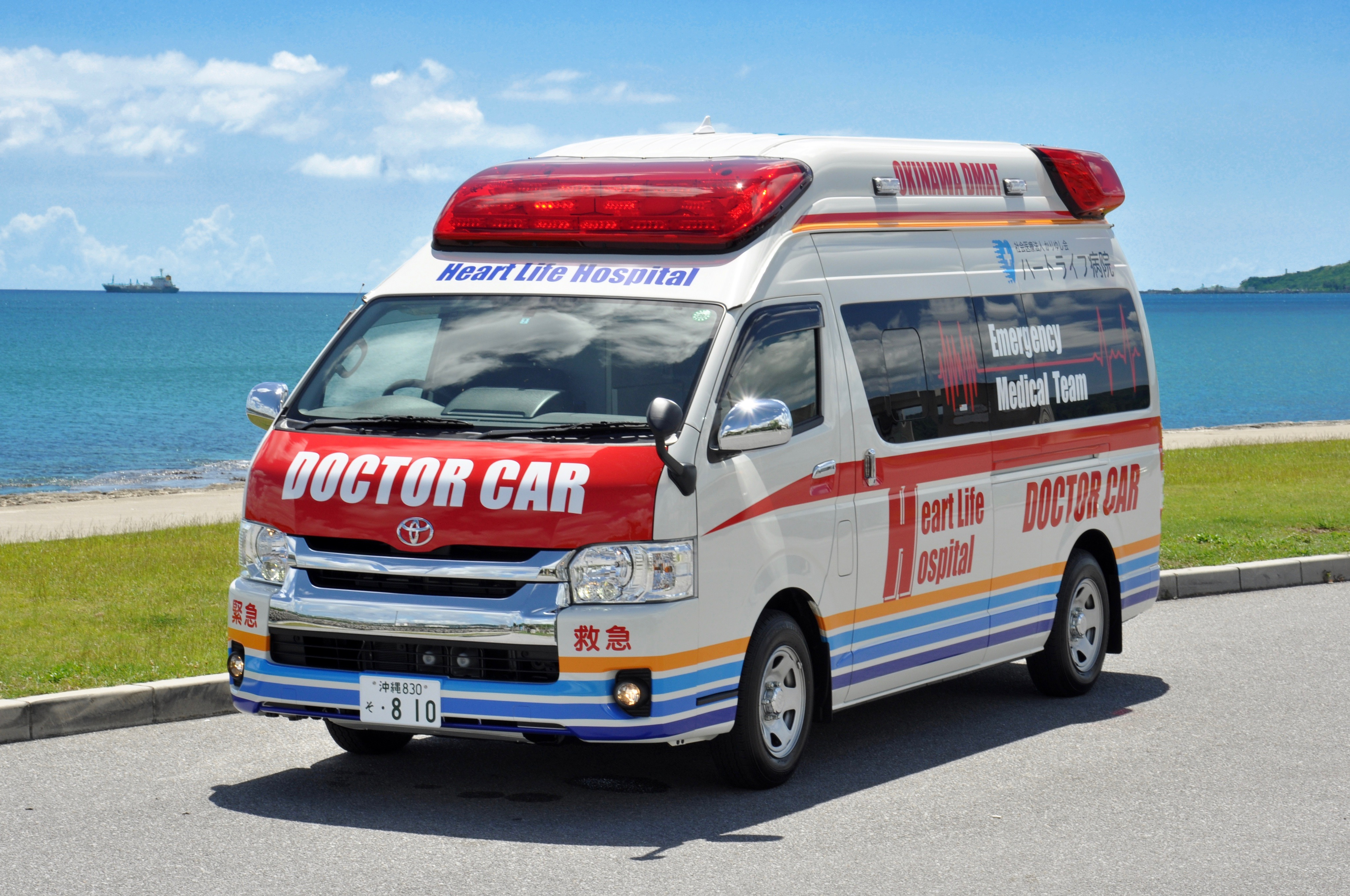 沖縄県中南部に位置するハートライフ病院のドクターカーには、DMATカーとして必須の機能であるインターネット環境を整備している。